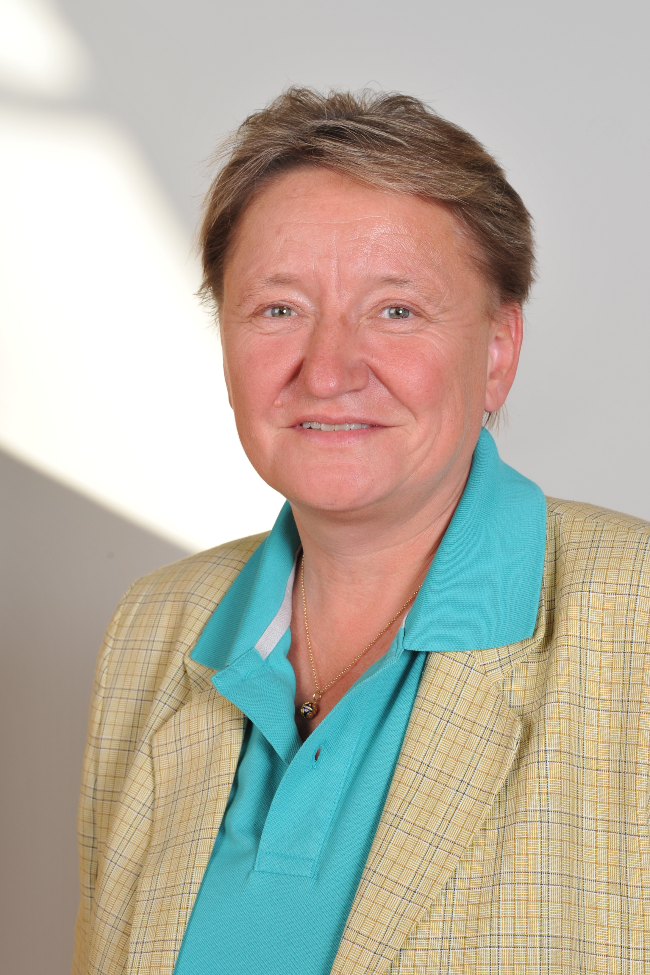 Landtagsprojekt Bayern The making of this work was supported by Wikimedia Austria. For other files made with the support of Wikimedia Austria, please see the category Supported by Wikimedia Österreich. Wikipedia im Landtag – Bayern 17. bis 19. Juli 2012 in MünchenDieses Foto wurde im Rahmen des Projektes „Wikipedia im Landtag“ erstellt.